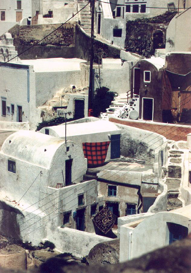 Oia auf Santorini